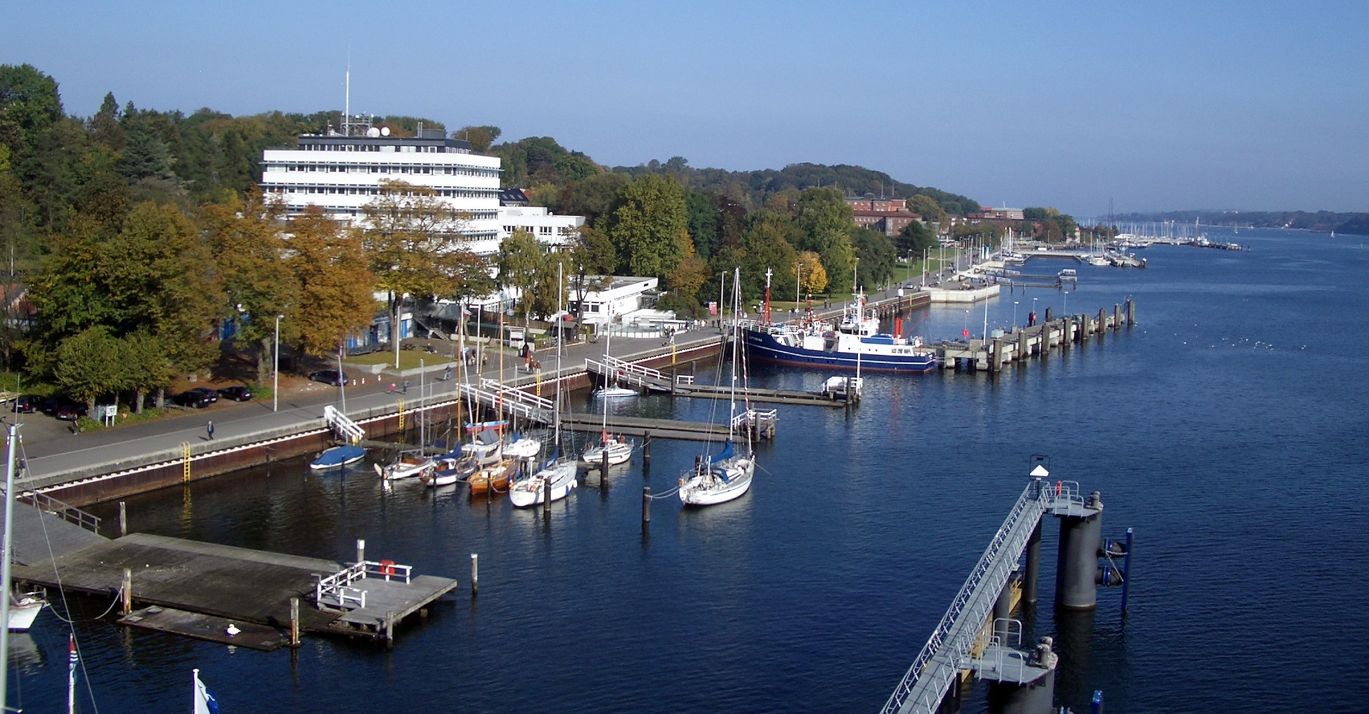 Blick auf die Kiellinie von Kiel mit dem IfM/GEOMAR, den Ruderclubs und dem Landeshaus.